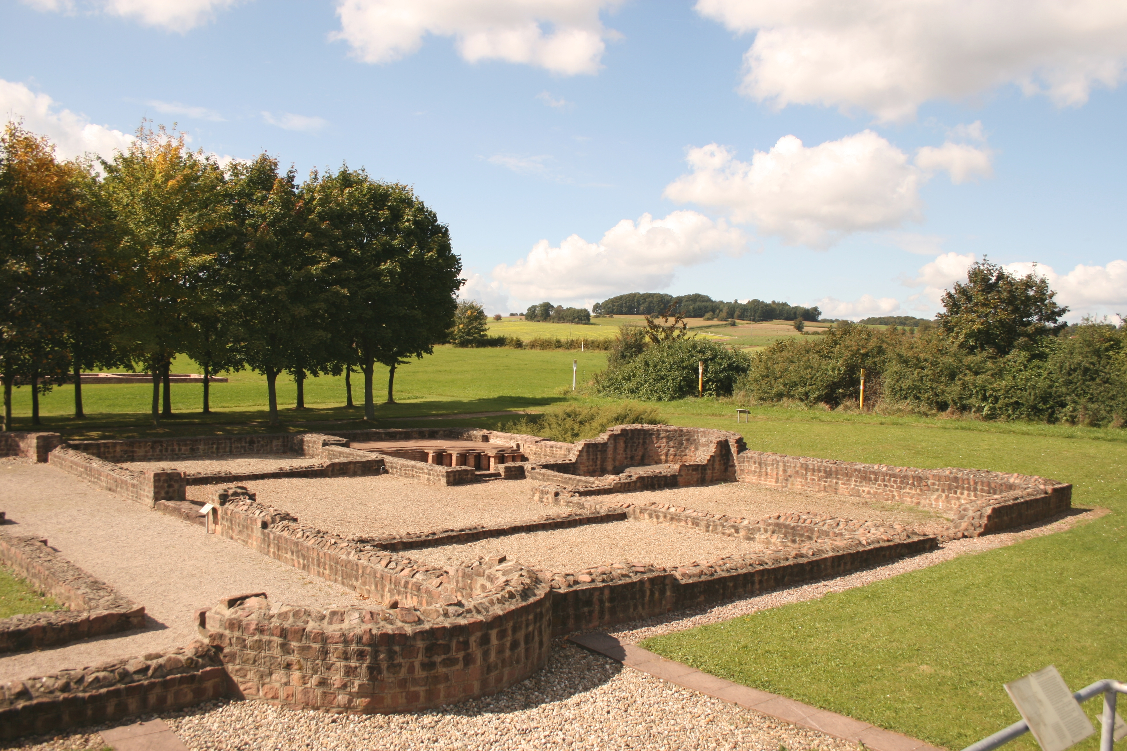 Hauptgebäude der Villa rustica "Haselburg" Wohntrakt von Osten.